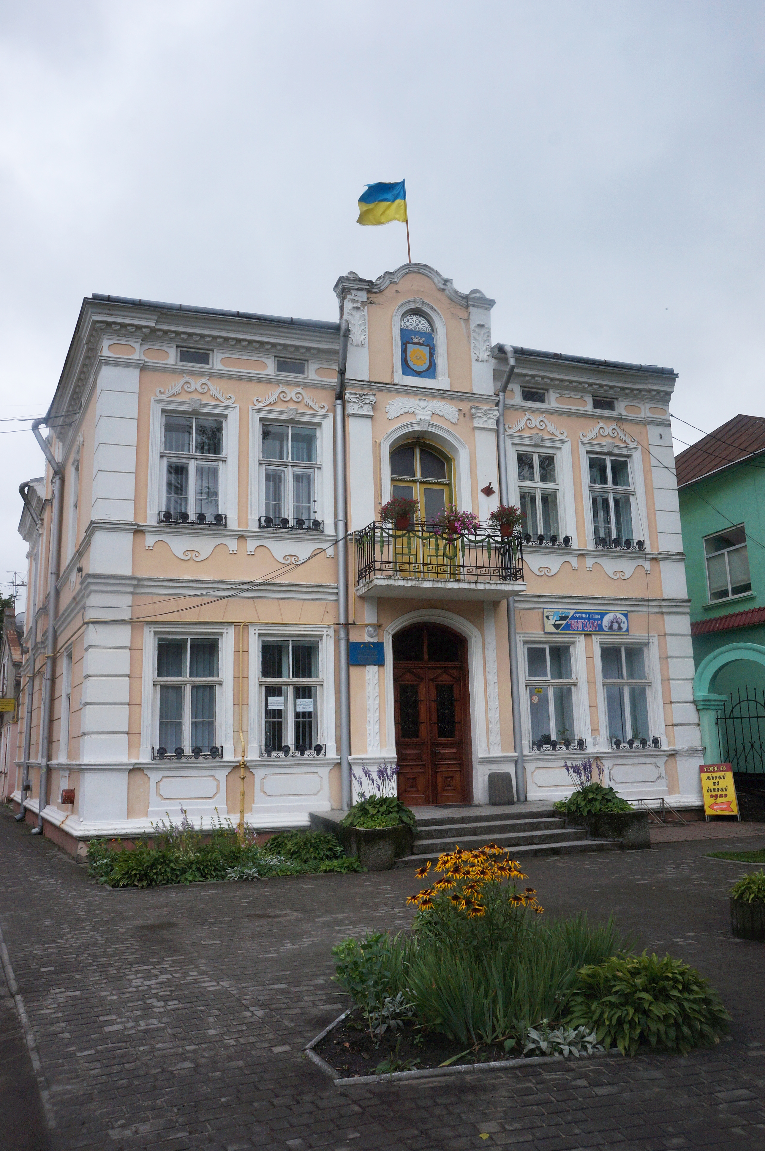 Житловий будинок, Радехів, вул. І. Франка, 2